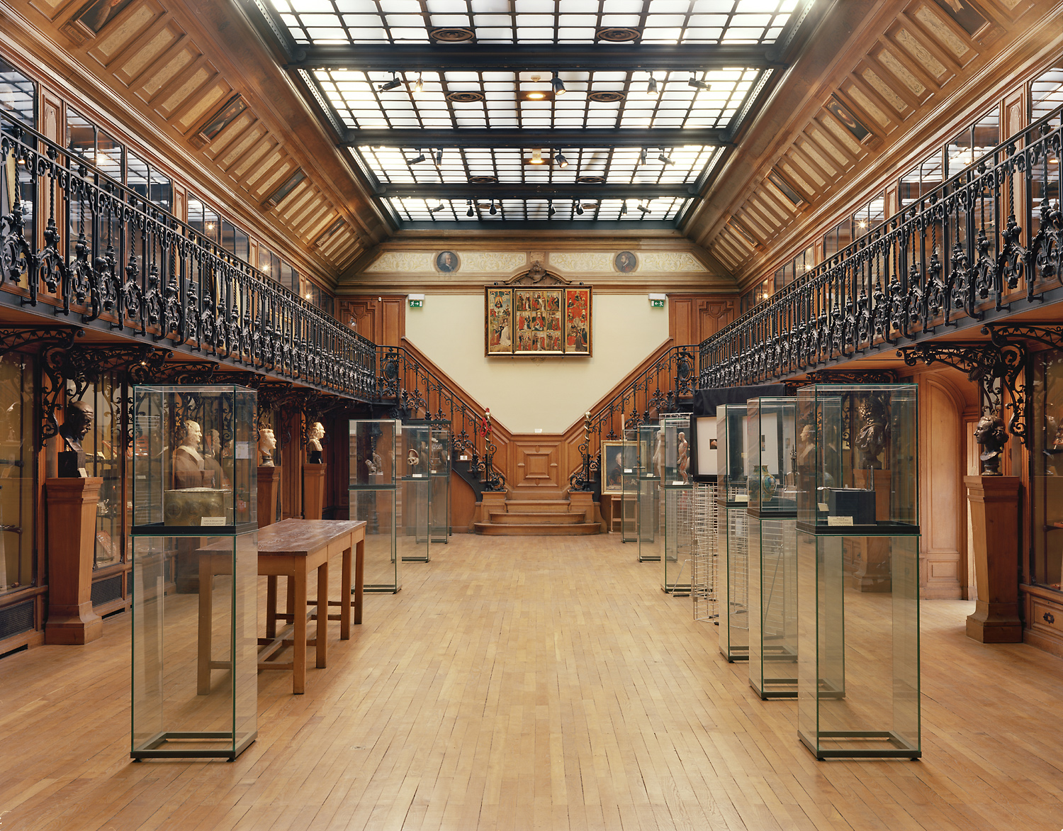 Vue centrale